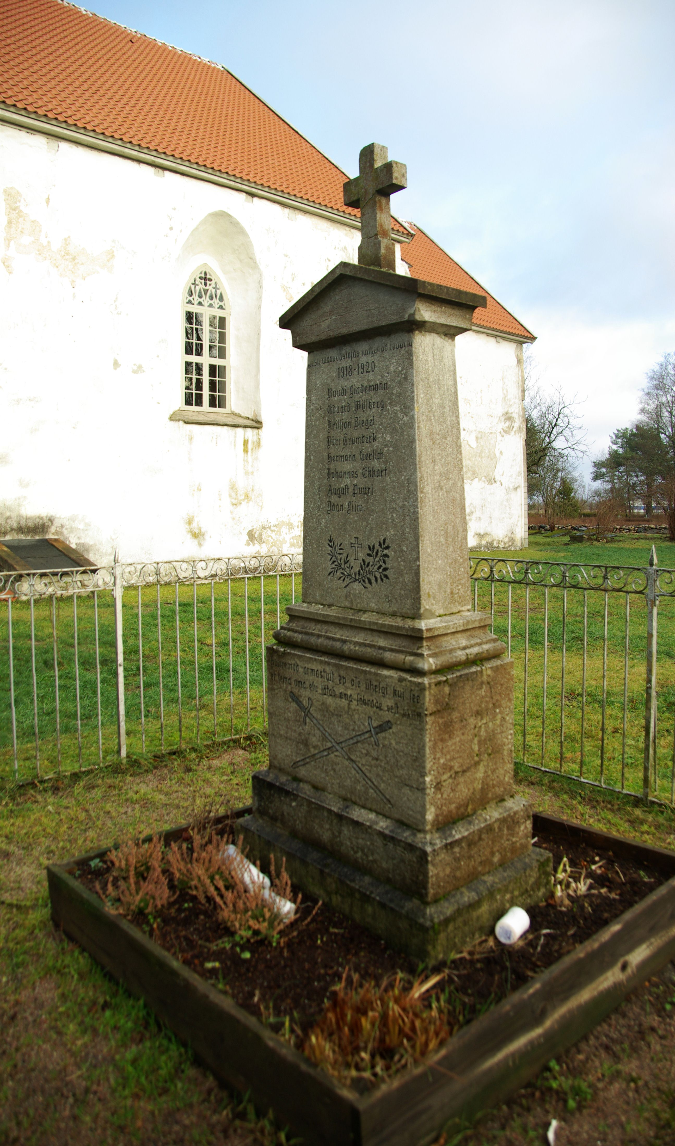 Vabadussõja mälestussammas